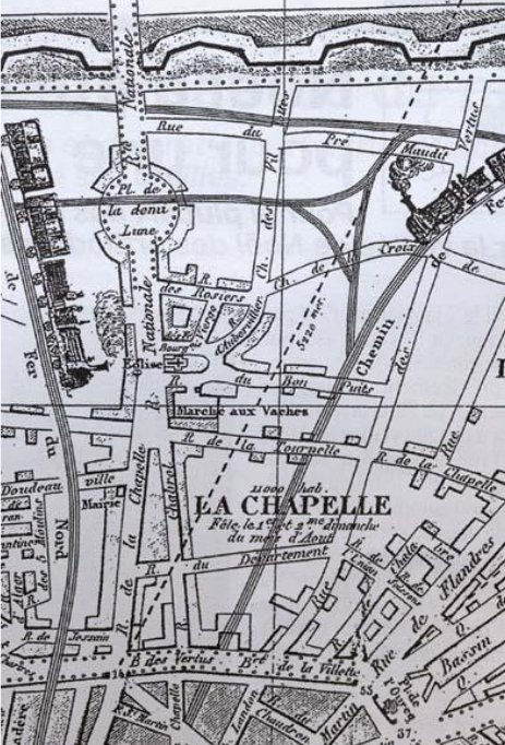 Détail d'une carte de la commune La Chapelle Saint-Denis, au Nord de Paris, vers 1860.